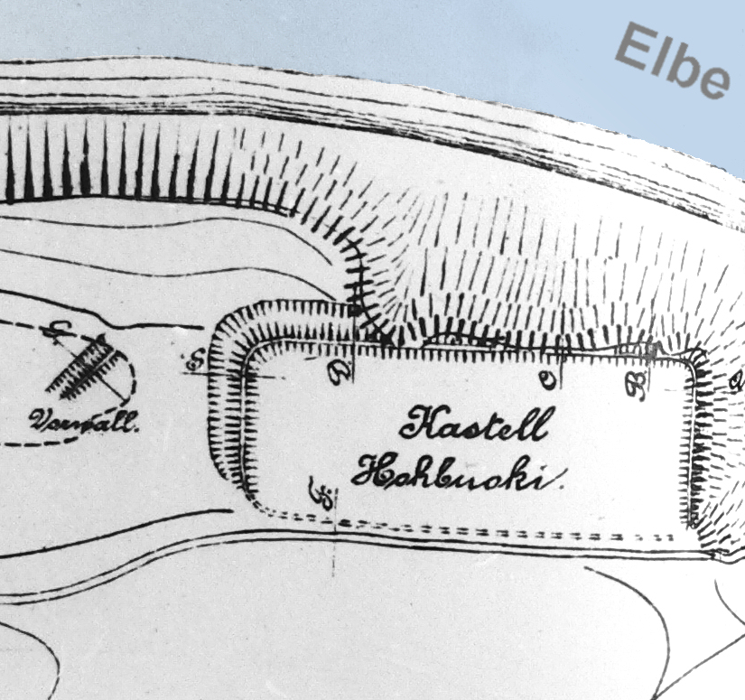 Die Vietzer Schanze, auch Höhbeck Kastell genannt, Zeichnung durch Schuchhardt, Elbe nachträglich blau eingefärbt